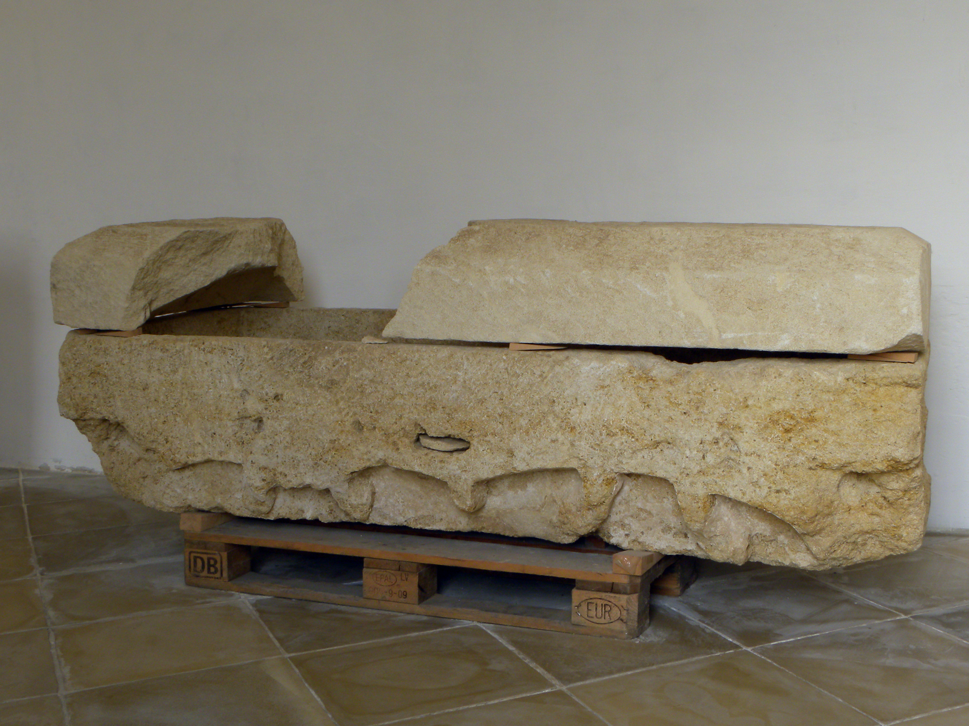 Dieses Bild wurde anlässlich des österreichischen Tags des Denkmals 2012 in Niederösterreich eingereicht.